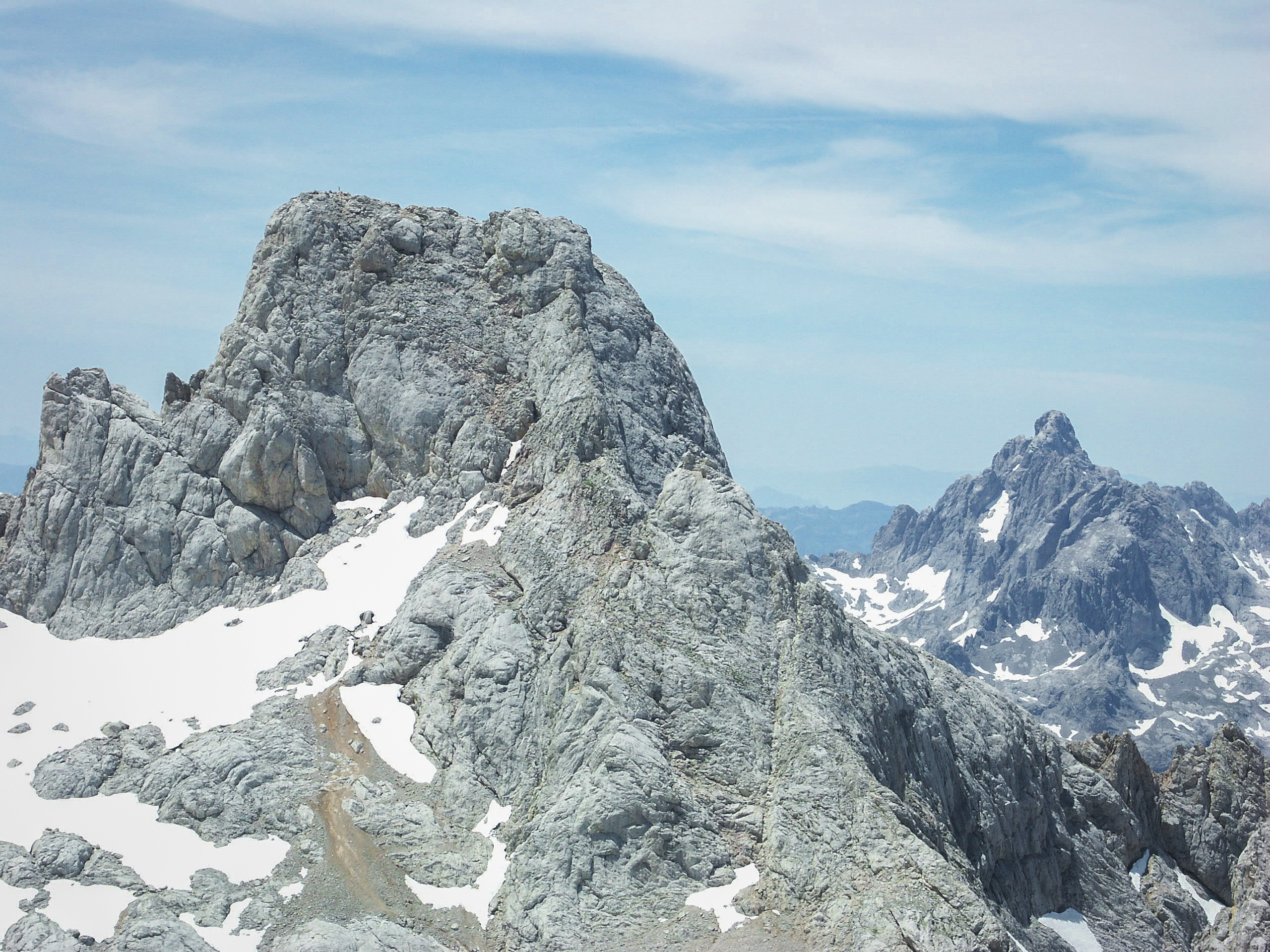 Torrecerredo desde la Torre de la Párdida. Al fondo, ya en el Cornión, la Peña Santa.